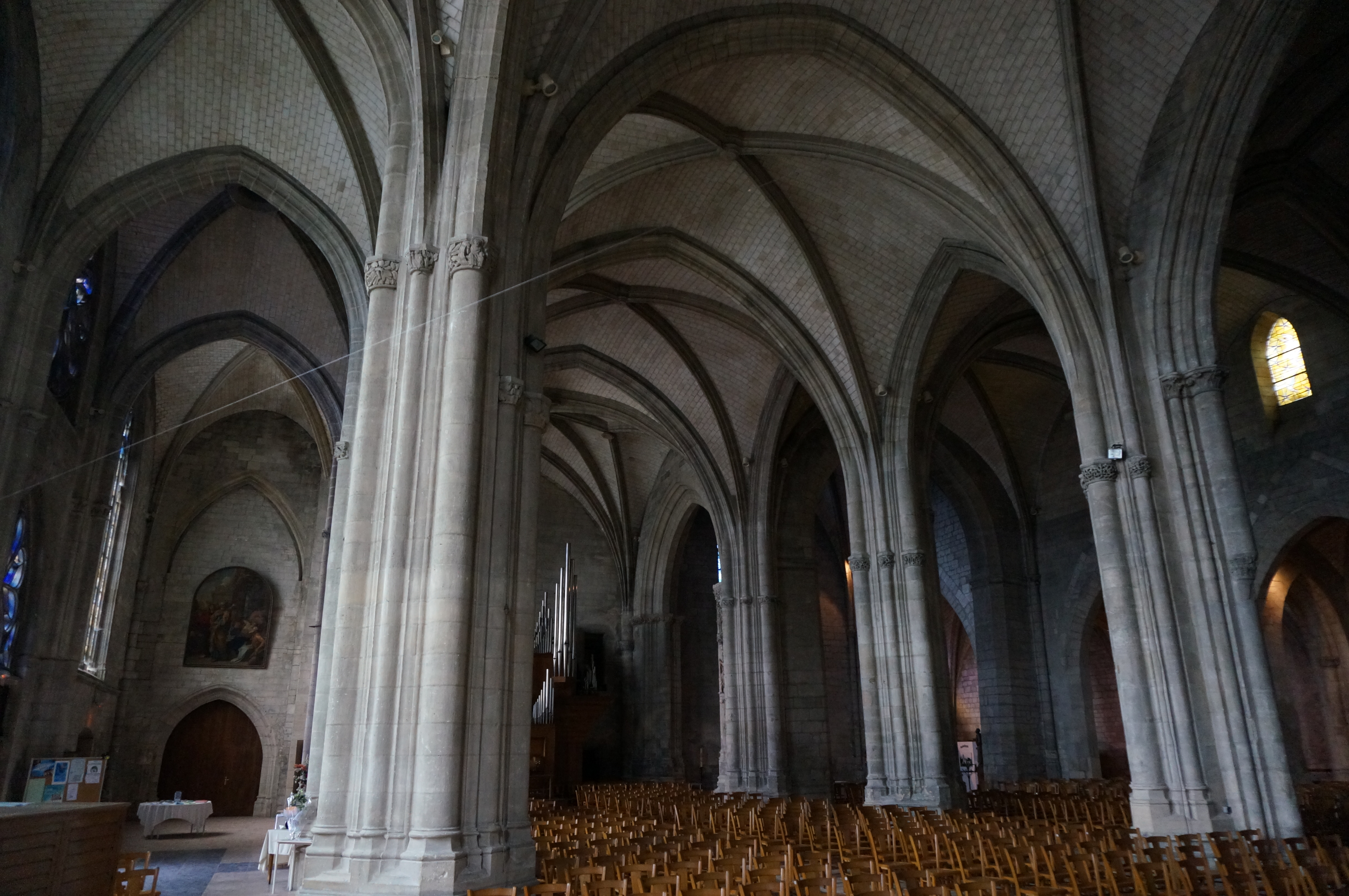 en l'Église Saint-Nicolas de Rethel .